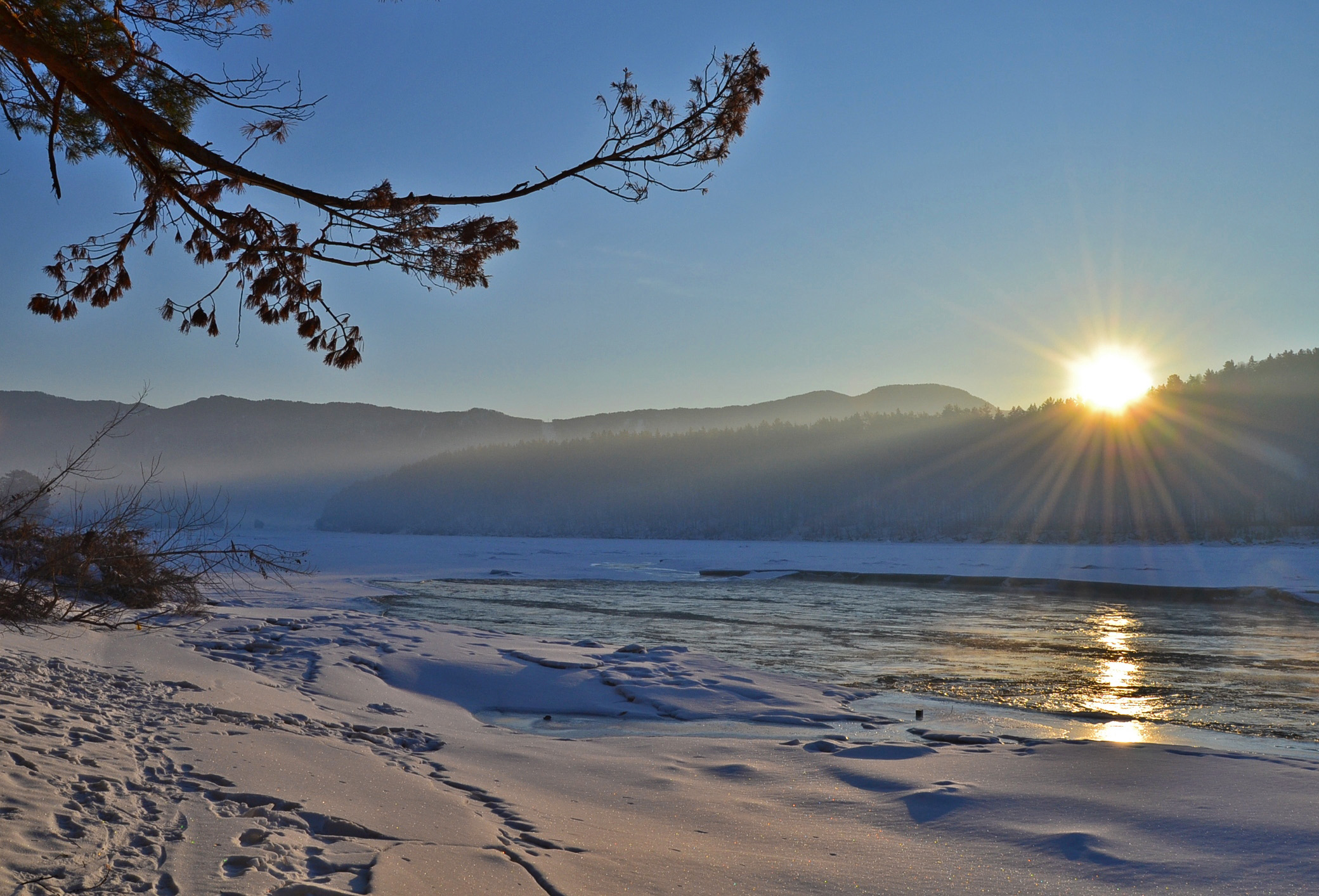 Утренние пейзажи на турбазе "Манжерок", в одноименном поселке.